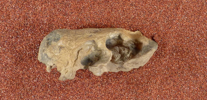 Euchambersia mirabilis Broom, 1931